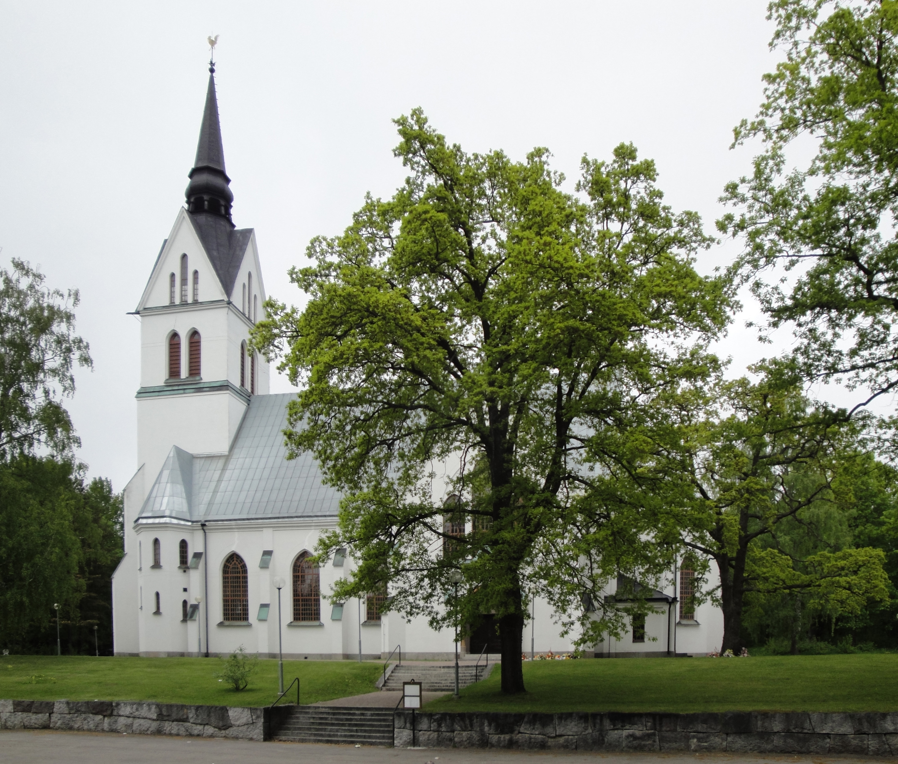 Skutskärs kyrka eller Johanneskyrkan, Älvkarleby kommun.